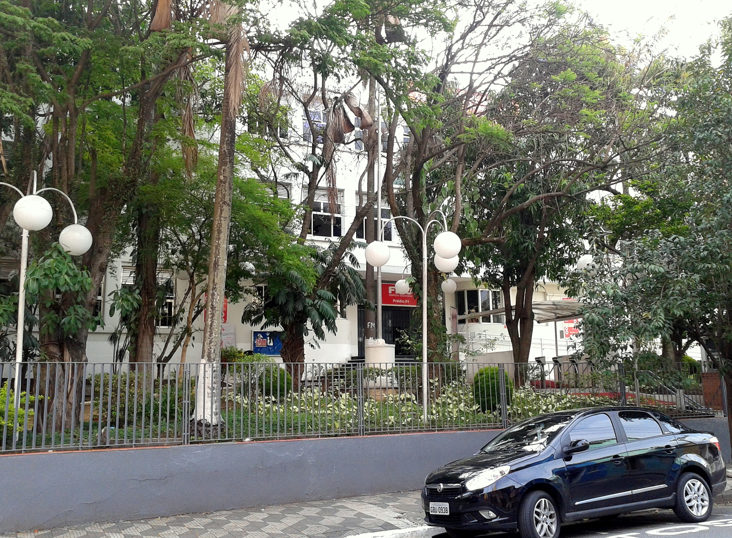 FMU (Faculdades Metropolitanas Unidas) - Campus na Liberdade. São Paulo, SP, Brasil.